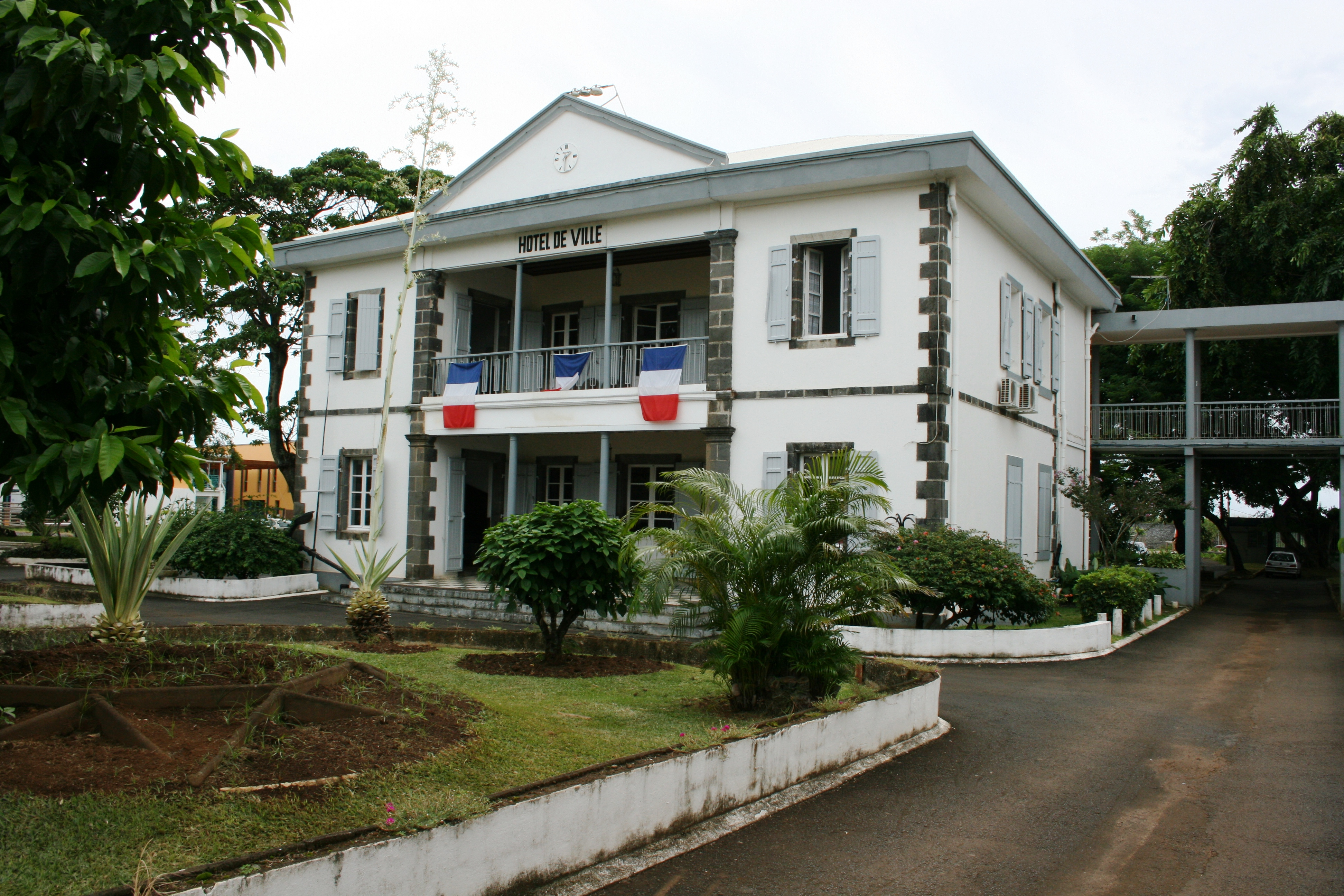 Vue de l'hôtel de ville de Sainte-Marie de La Réunion.